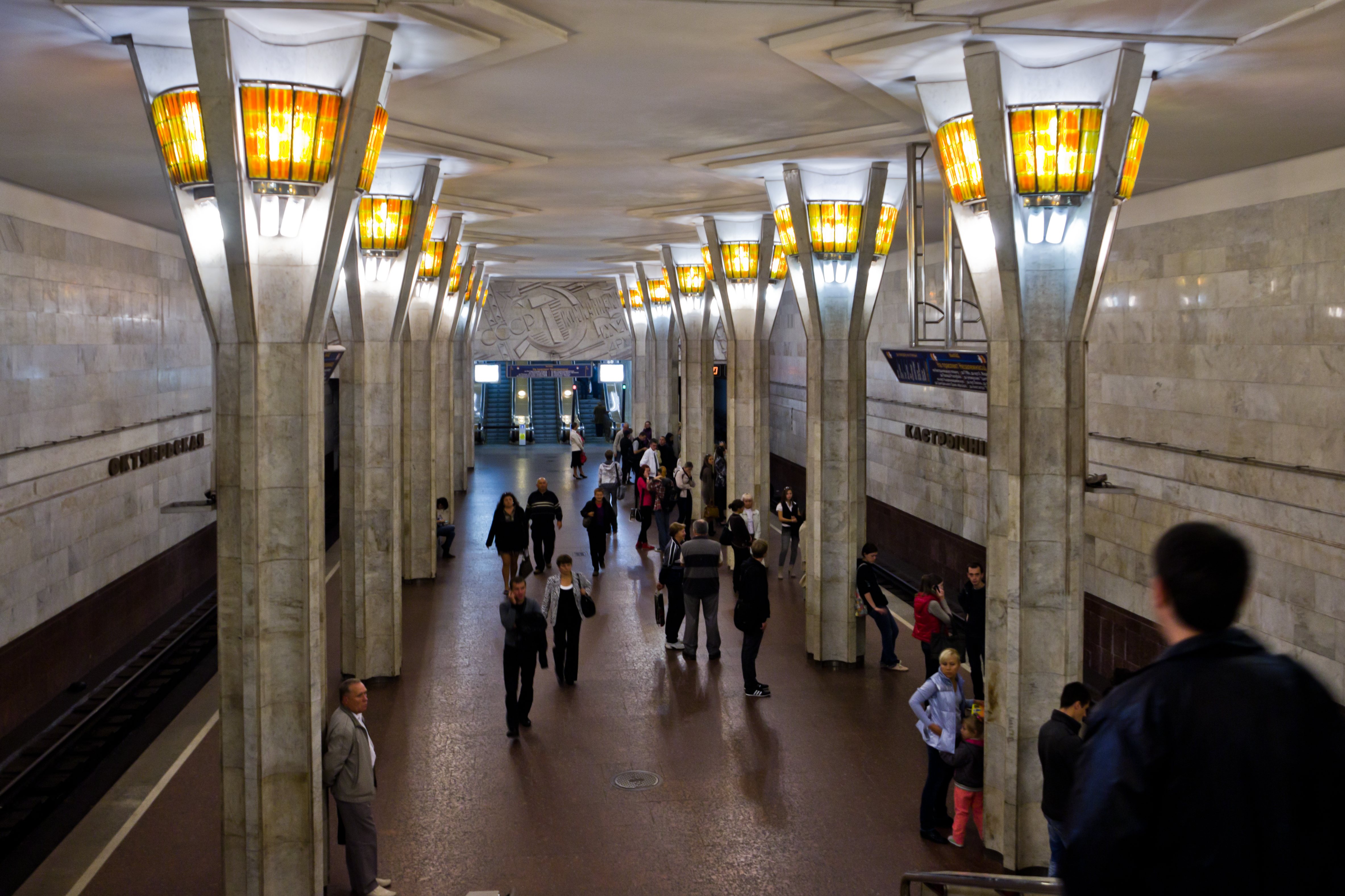 Станция метро «Октябрьская», Минск